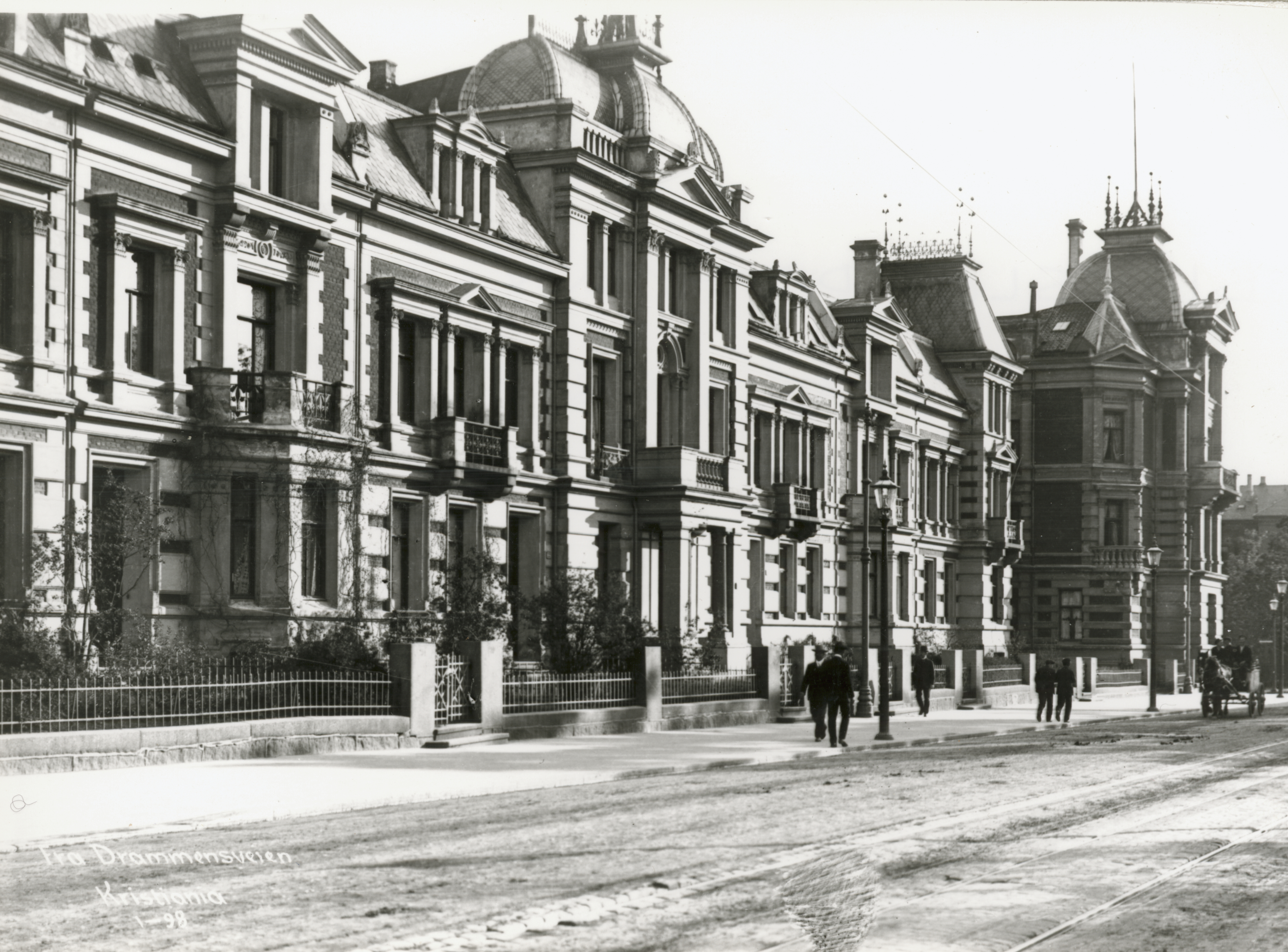 Det engelske kvarter i Oslo, Oslo This image on crowdsourcing geotagging platform Fotodugnad